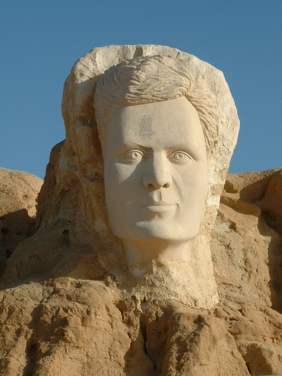 Photographie personnelle prise à Tozeur (Tunisie) représentant le visage du poète tunisien Abou el Kacem Chebbi